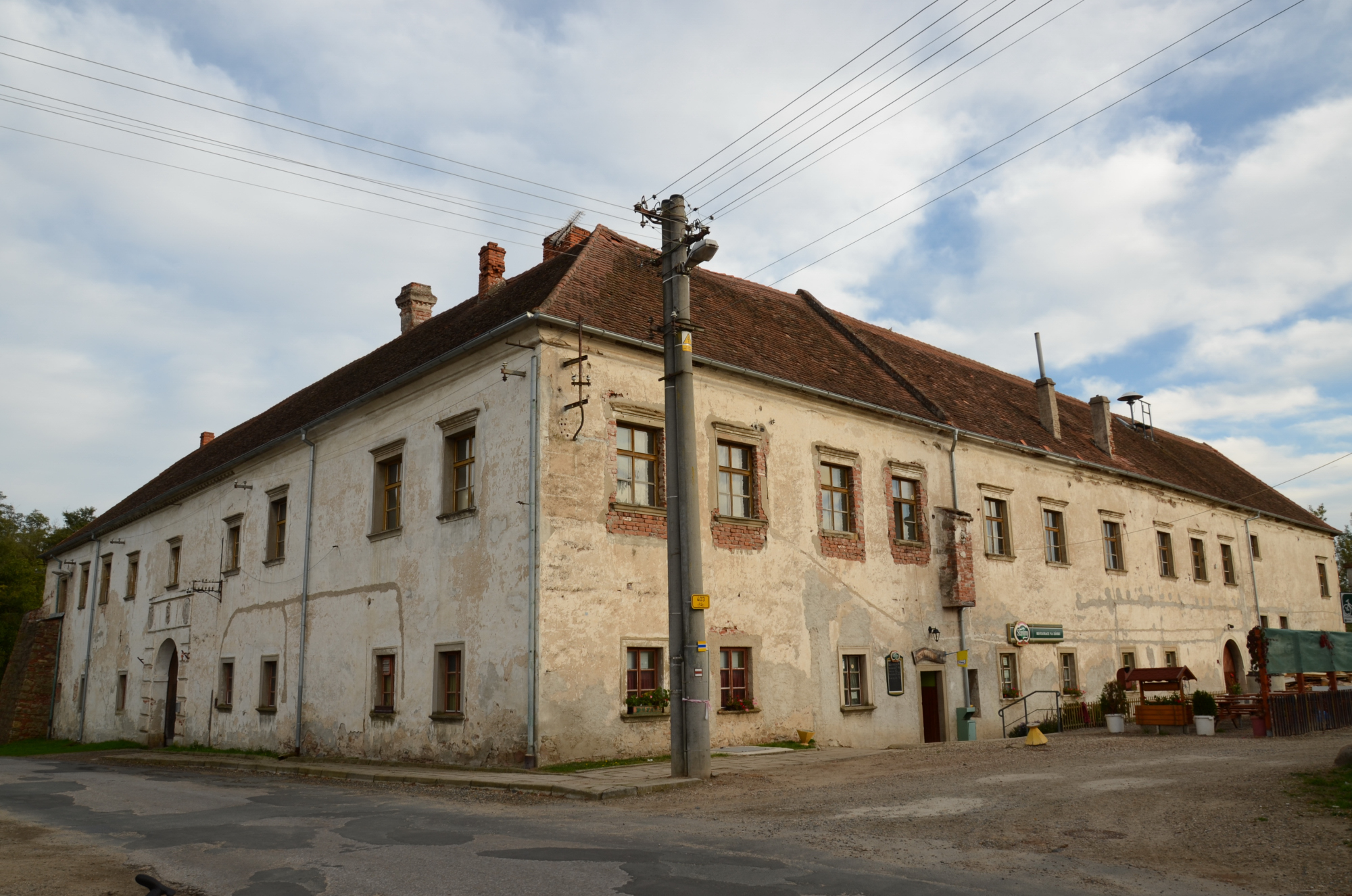 zámek (Hrubšice), Hrubšice 14